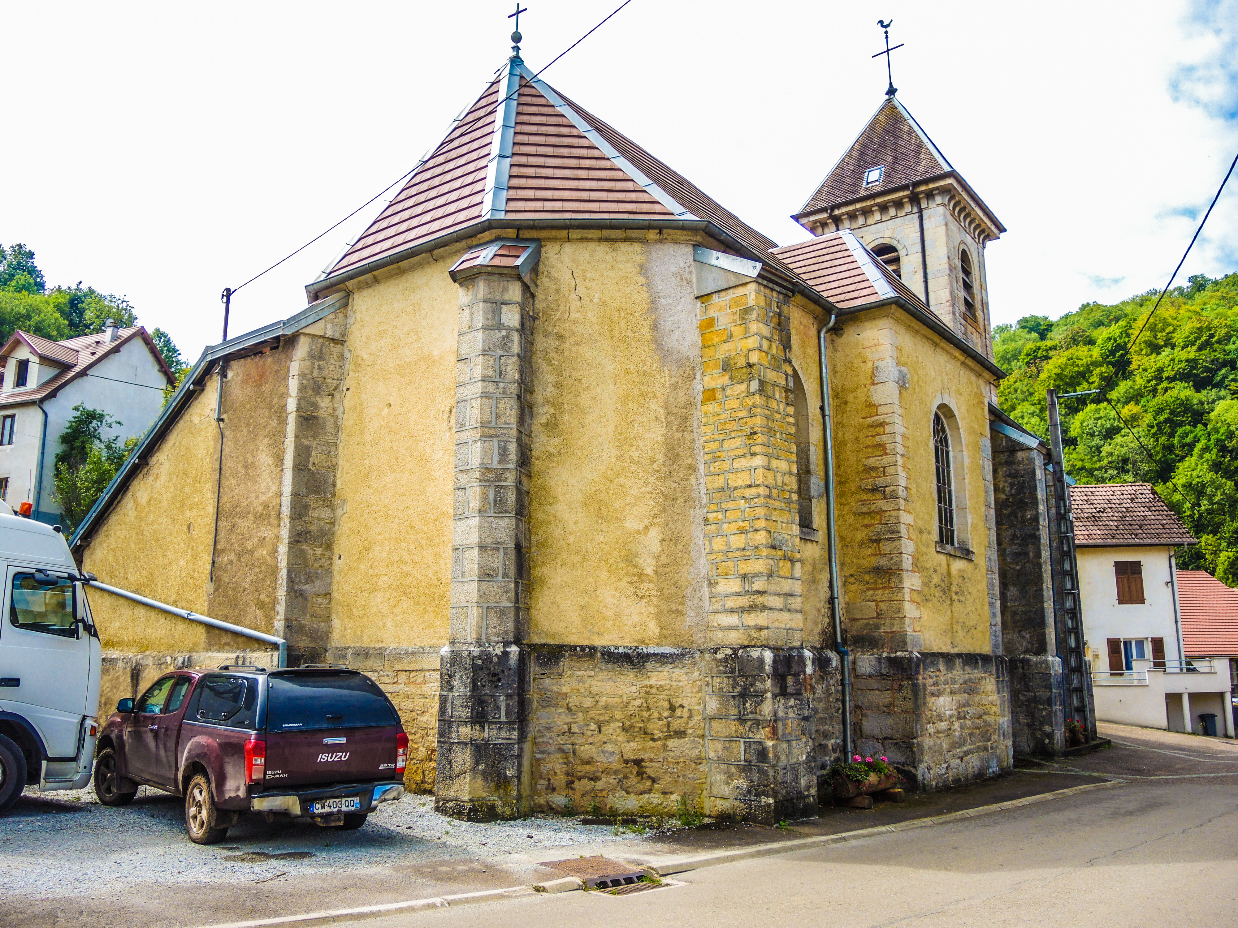 Vue arrière de l'église Saint Claude de Pont-les-Moulins. Doubs